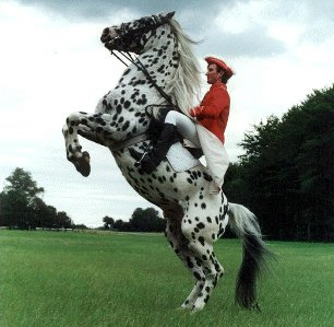 Beschreibung: Baron aus der schützenden Hand Quelle: Fotograf: Heinz Hackmann 09:46, 28. Jan 2005 Hackmann 343 x 335 (87797 Byte)